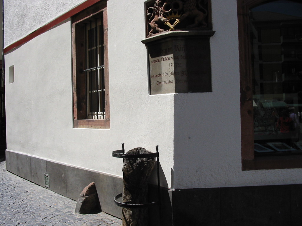 versteinerter Baumstamm am Hause Zum Beimburg, Kirschgarten, Mainz